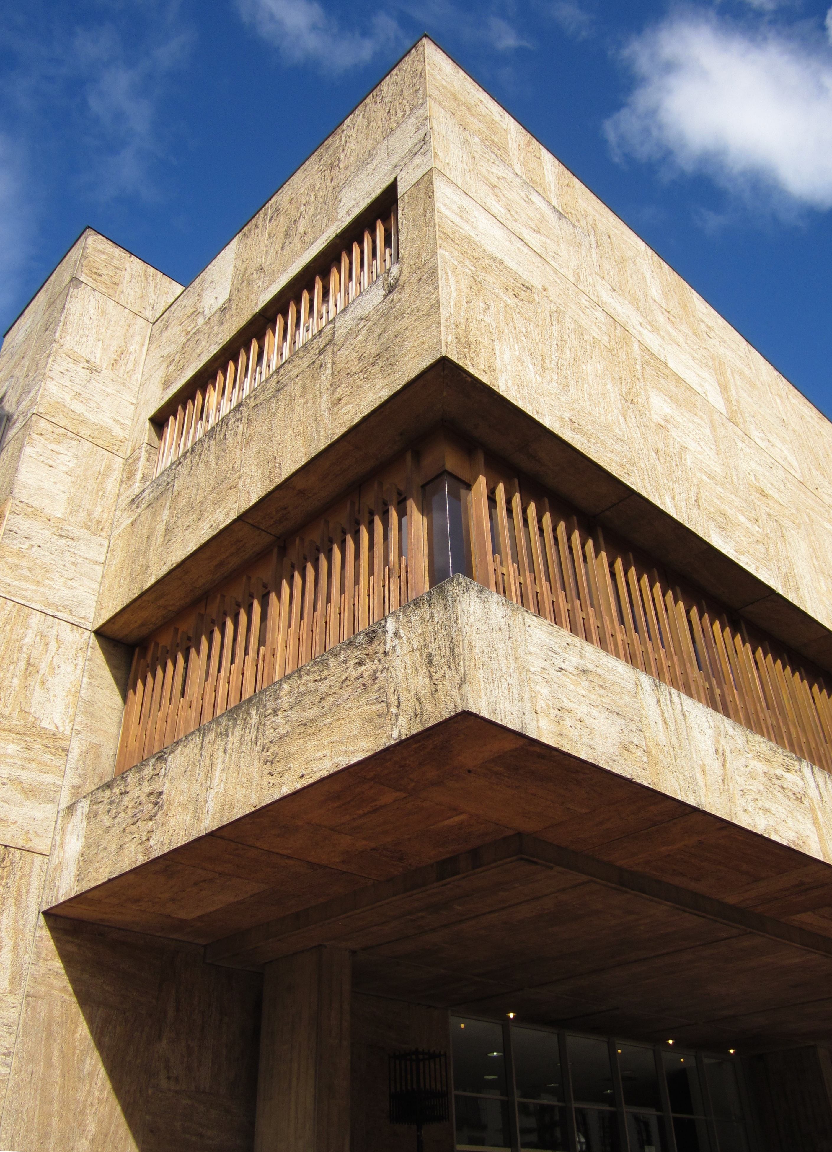 Esquina suroriental de la biblioteca Luis Ángel Arango en el barrio histórico de La Candelaria, en el centro de Bogotá.